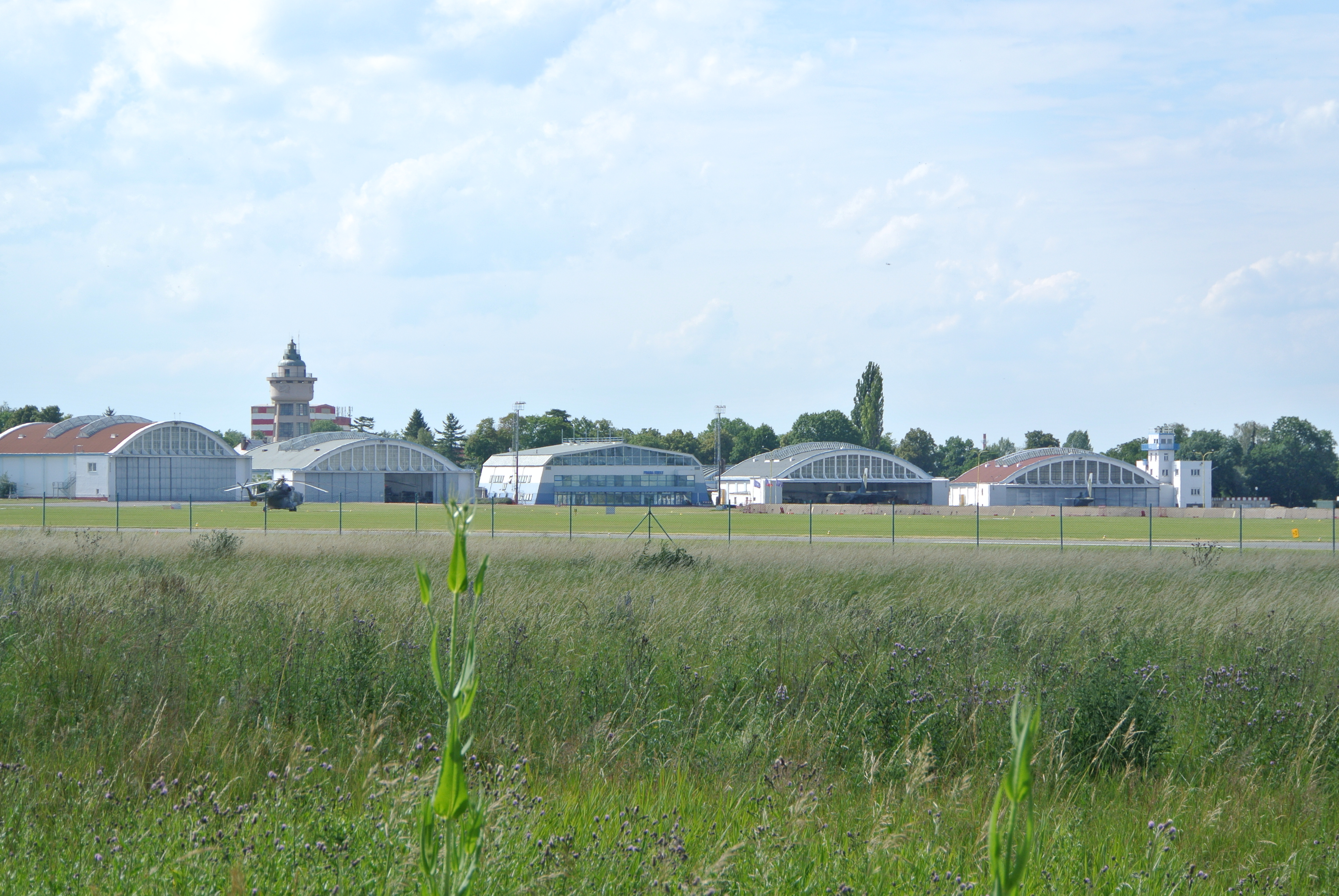 Kbely Airport ze dne 28.6.2014